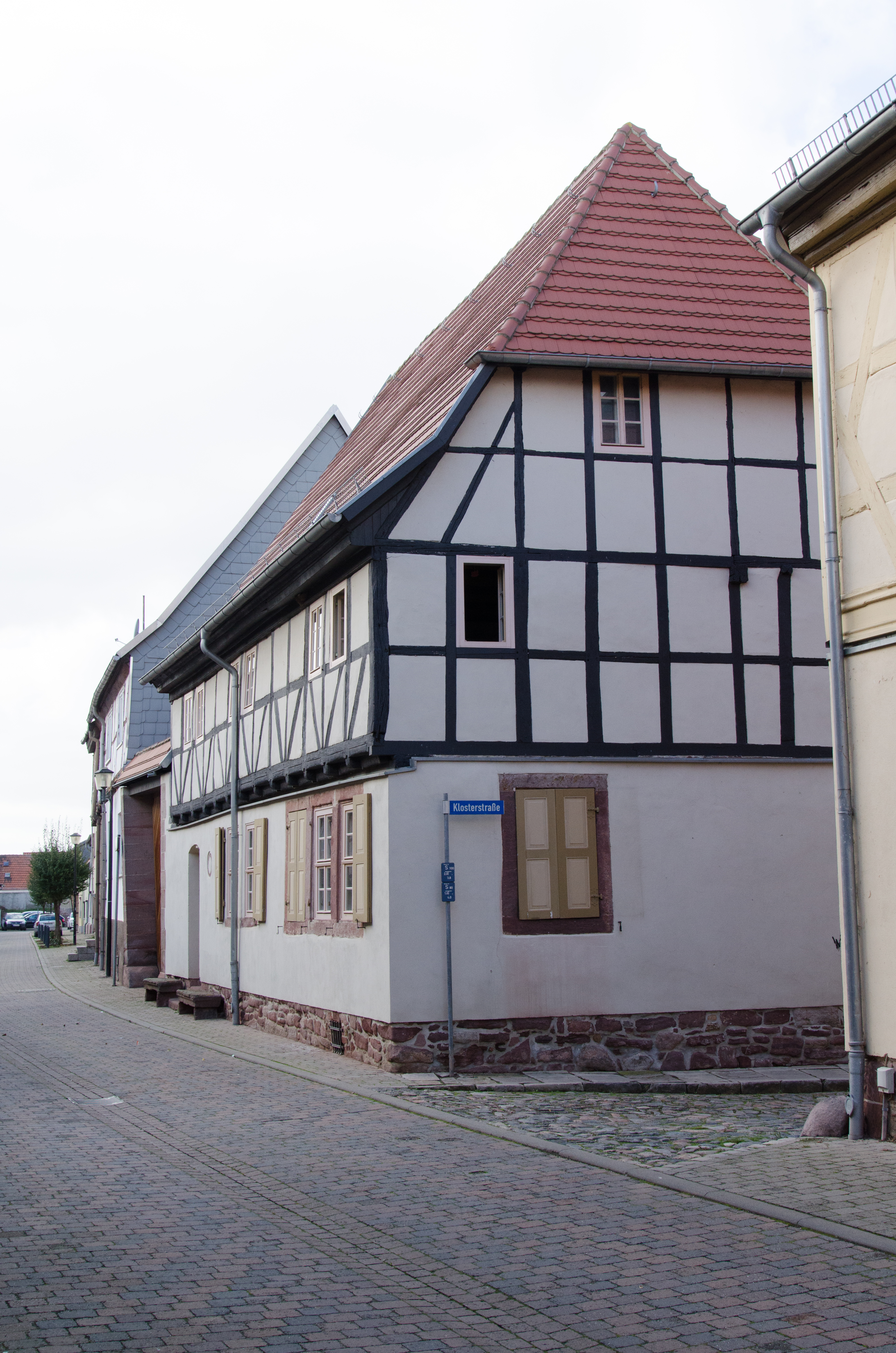 Kelbra, Mittelstraße 10